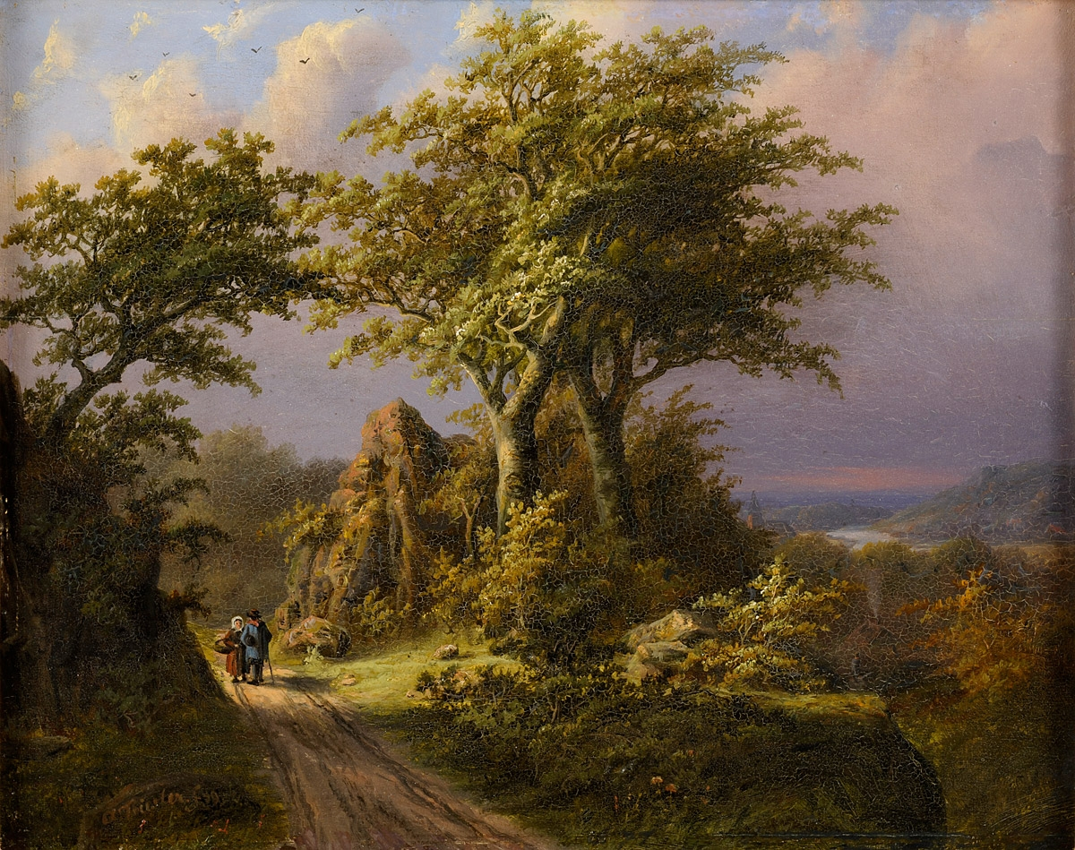 Bewaldete Sommerlandschaft. Signiert. Öl/Holz, 35,5 x 45 cm